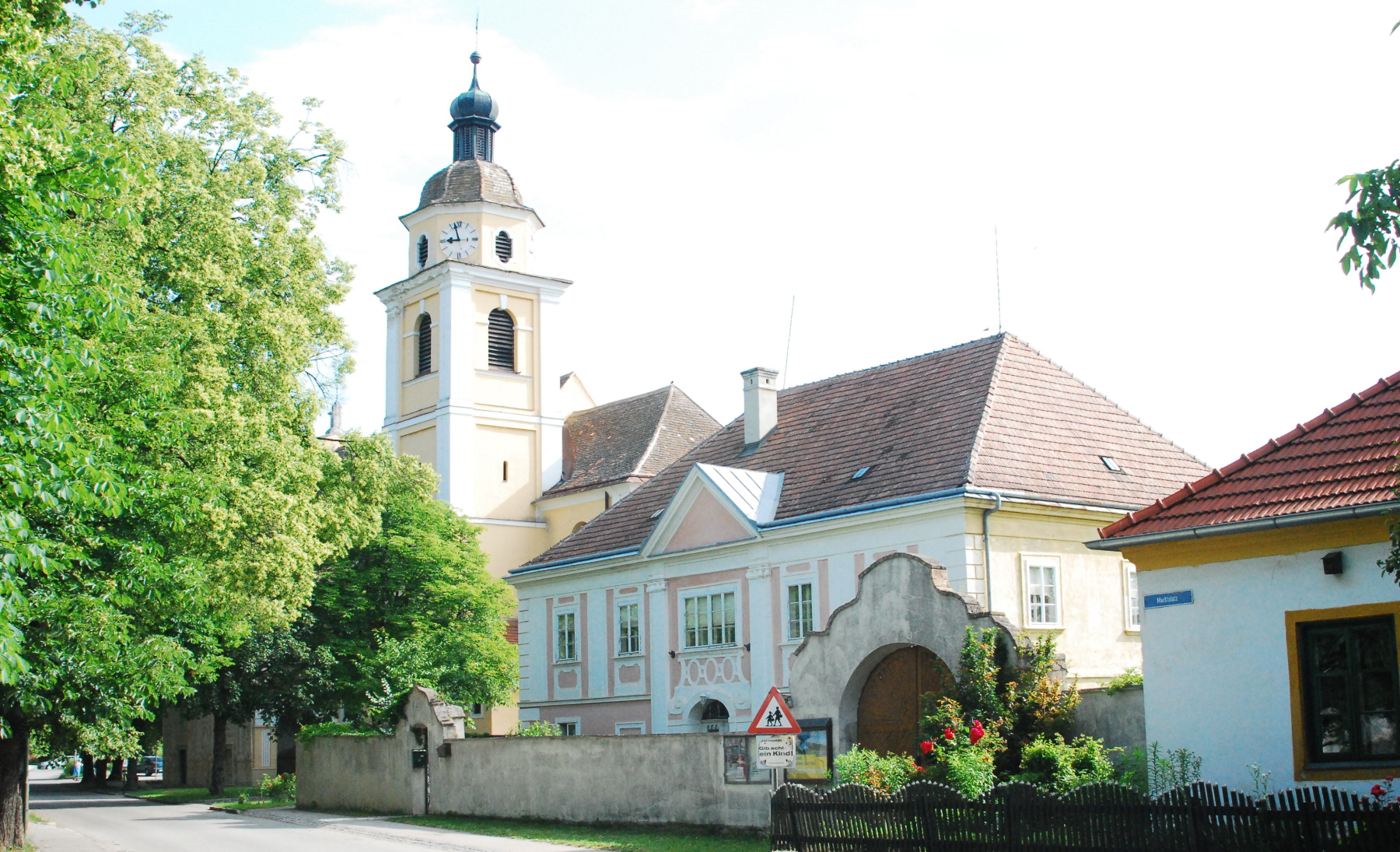 Der Pfarrhof von Straß im Straßertal in Niederösterreich